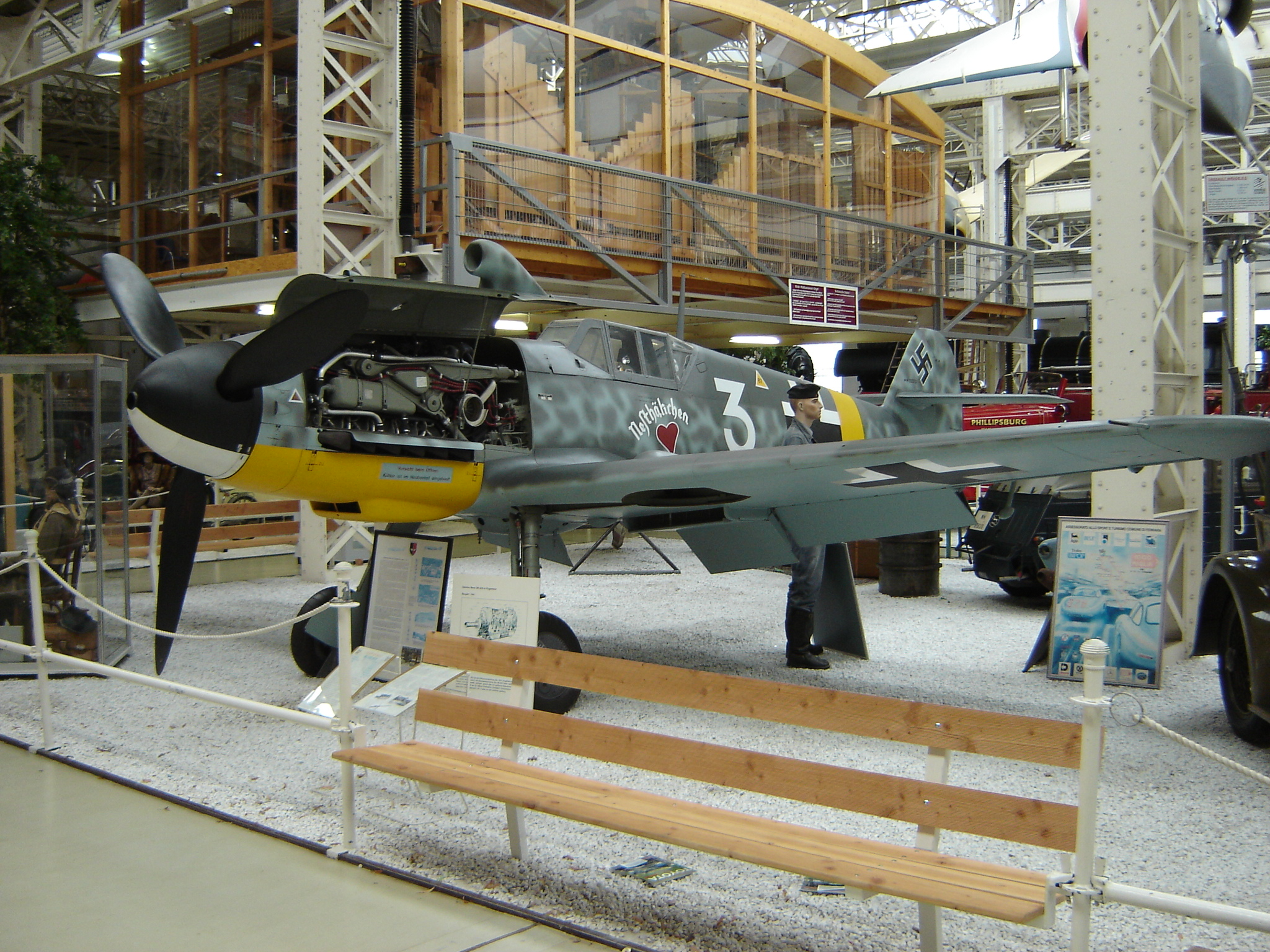 Messerschmitt Bf 109 (Speyer Museum)